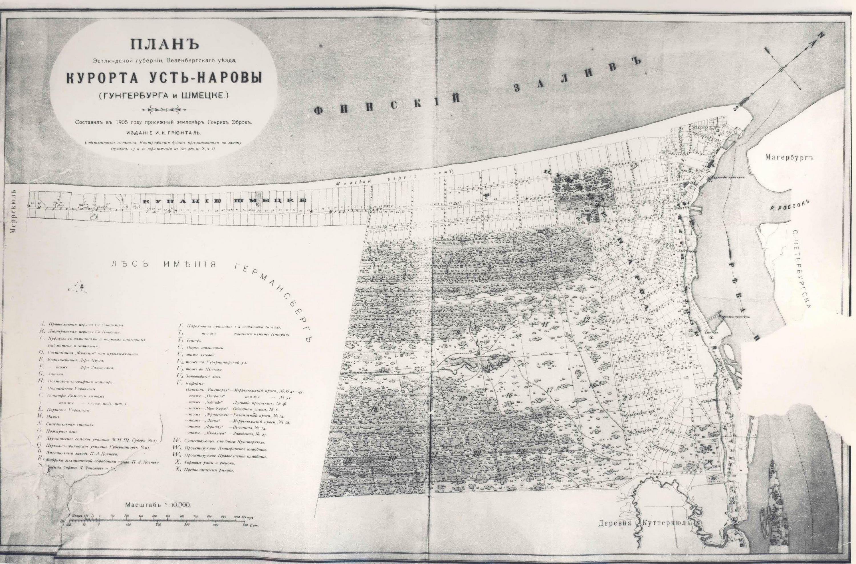 Hungerburgi kaart